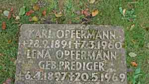 Die Grabstätte von Karl Opfermann.